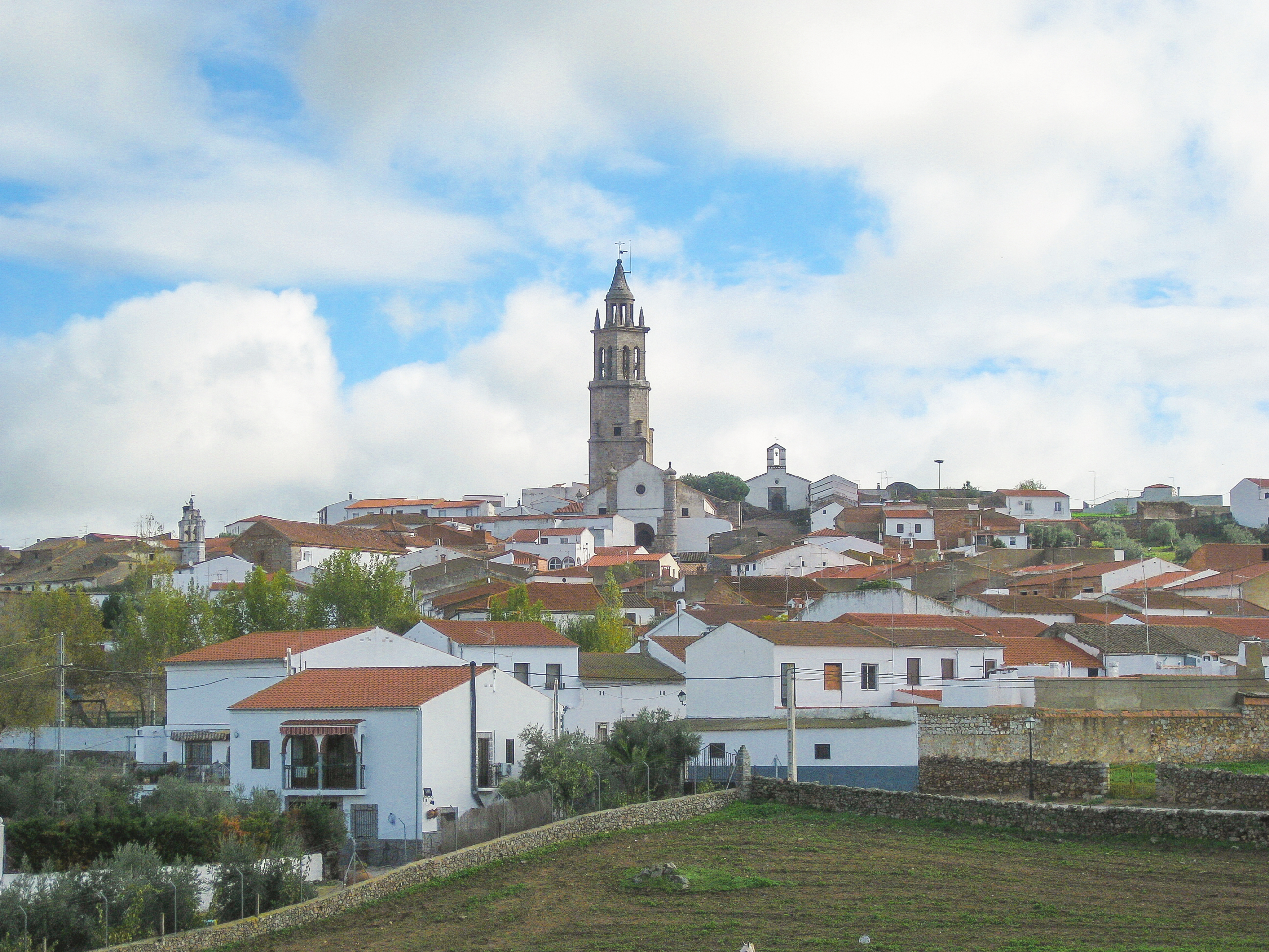 Imagen de Pedroche. Noviembre de 2012